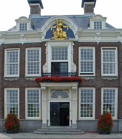 Stadhuis van Harlingen